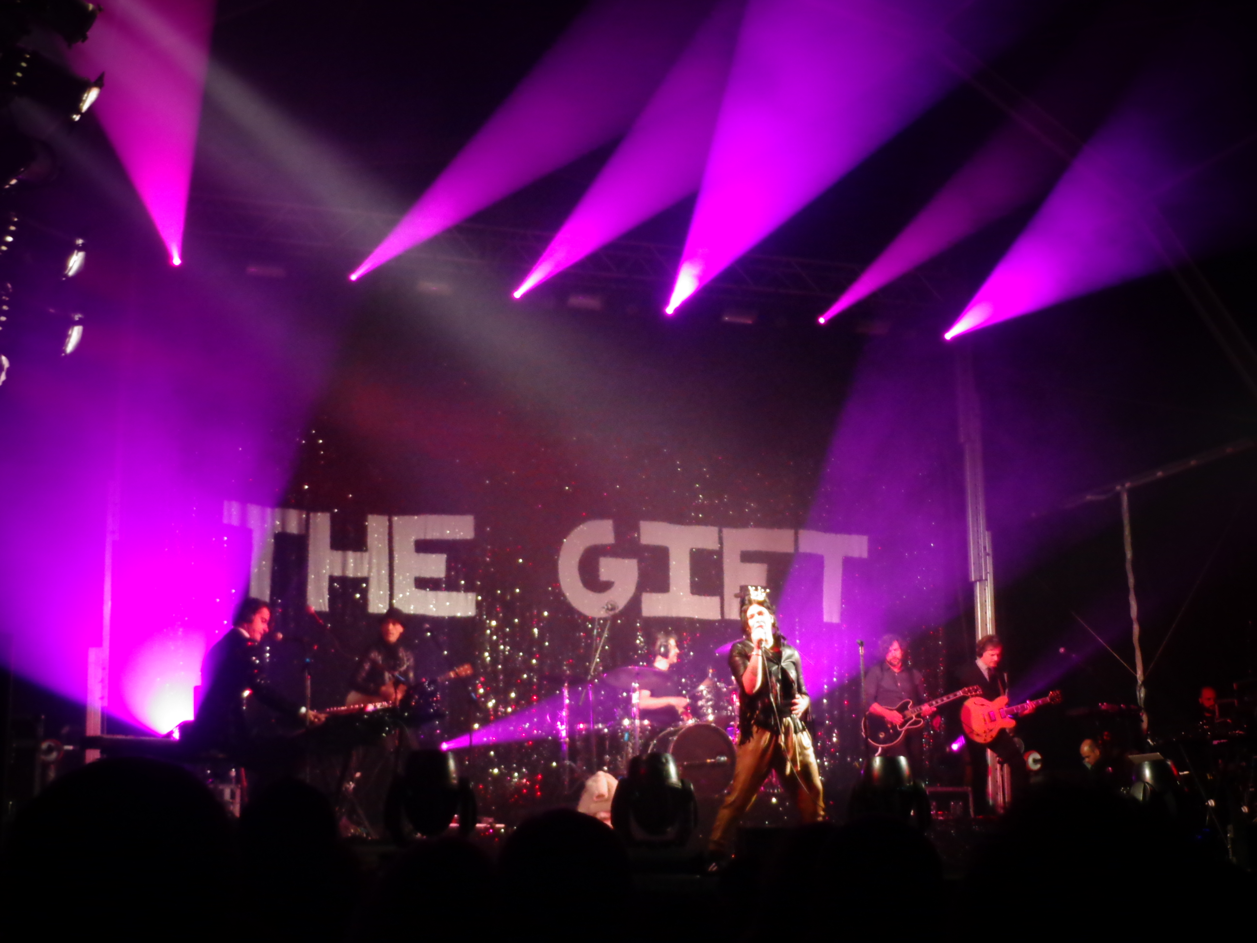 The Gift ao vivo em Aveiro, 2015